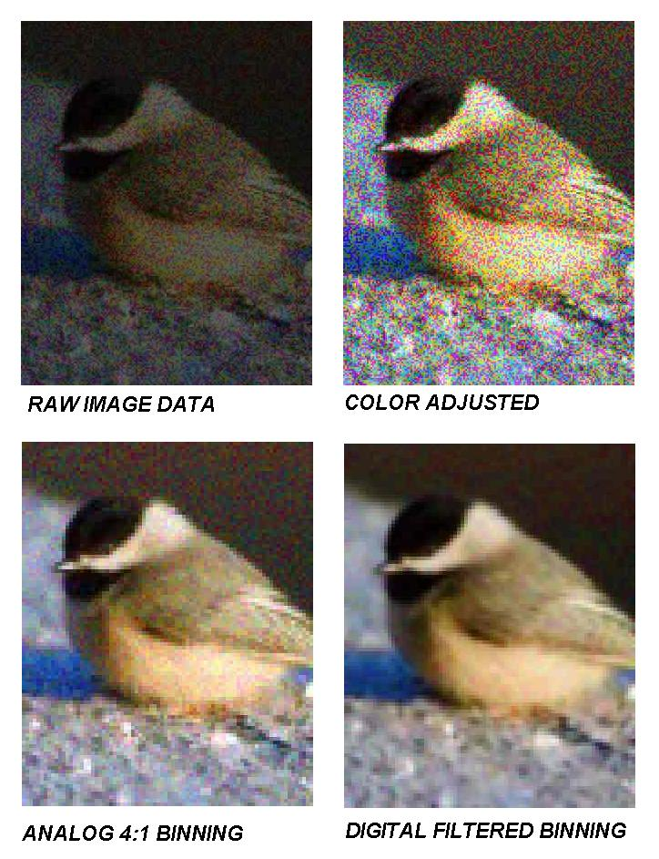 Digitales (rechnerisches) Zusammenfassen eines Sensorbildes. A) Rohdaten aus dem Sensor mit geringer Helligkeit und hohem Rauschen, B) automatischer Gamma- und Helligkeitsabgleich, C) Durch analoges binning auf dem Sensor erzeugtes Bild mit höherem Signalrauschabstand und geringerer Auflösung, D) alternativ digitales Bild mit ebenfalls reduzierter Auflösung, jedoch weiter verbessertem Signal-Rauschanstand